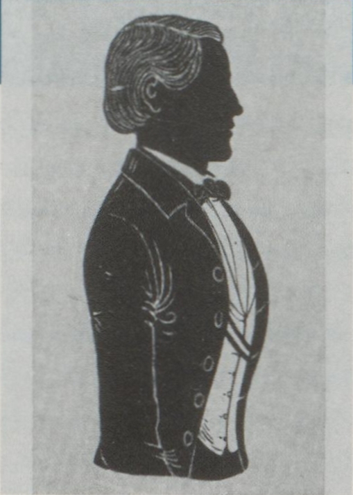 Max Eyth als Mitglied des Corps Stauffia Stuttgart, Scherenschnitt, 1855.